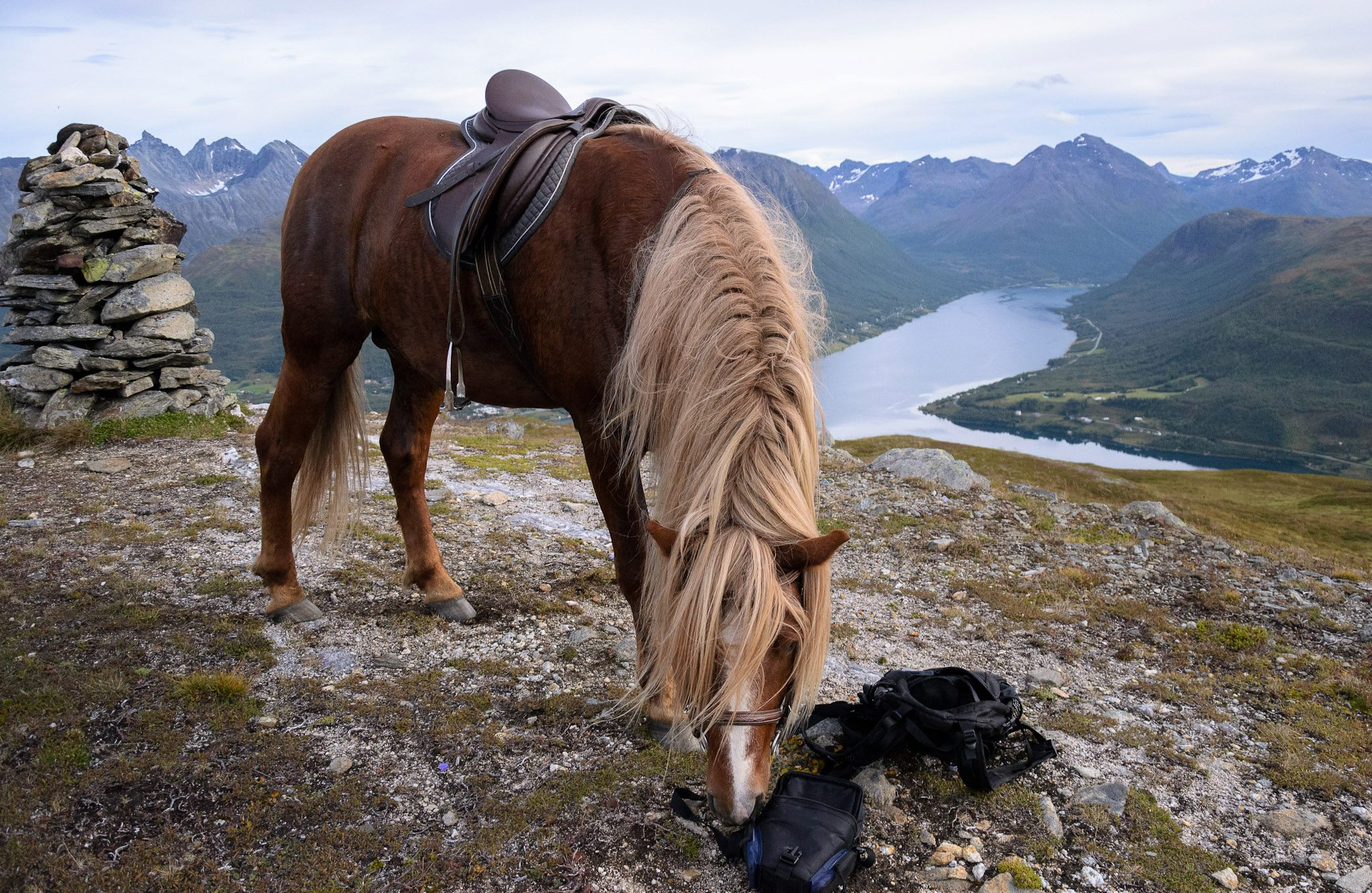 Allsidig hest